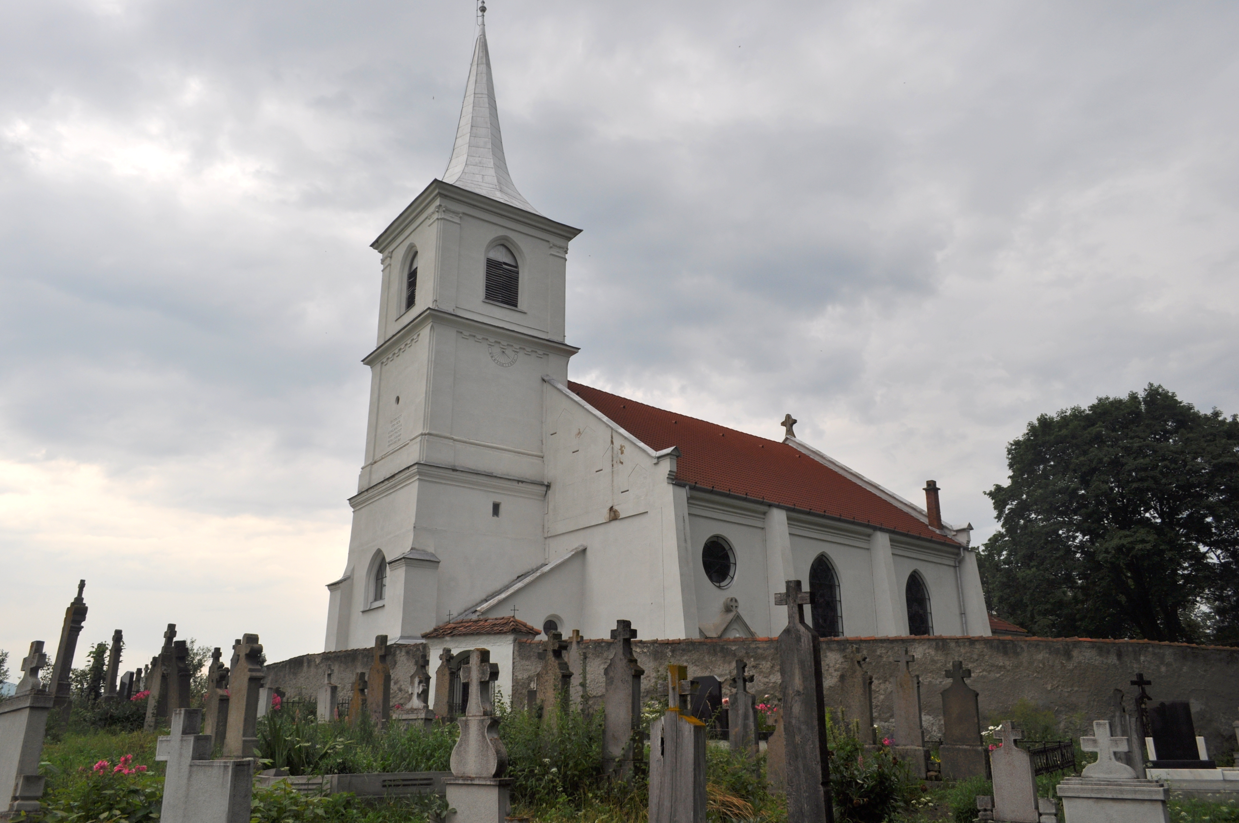 Biserica romano-catolică „Christos Rege” din Plăieșii de Jos, județul Harghita